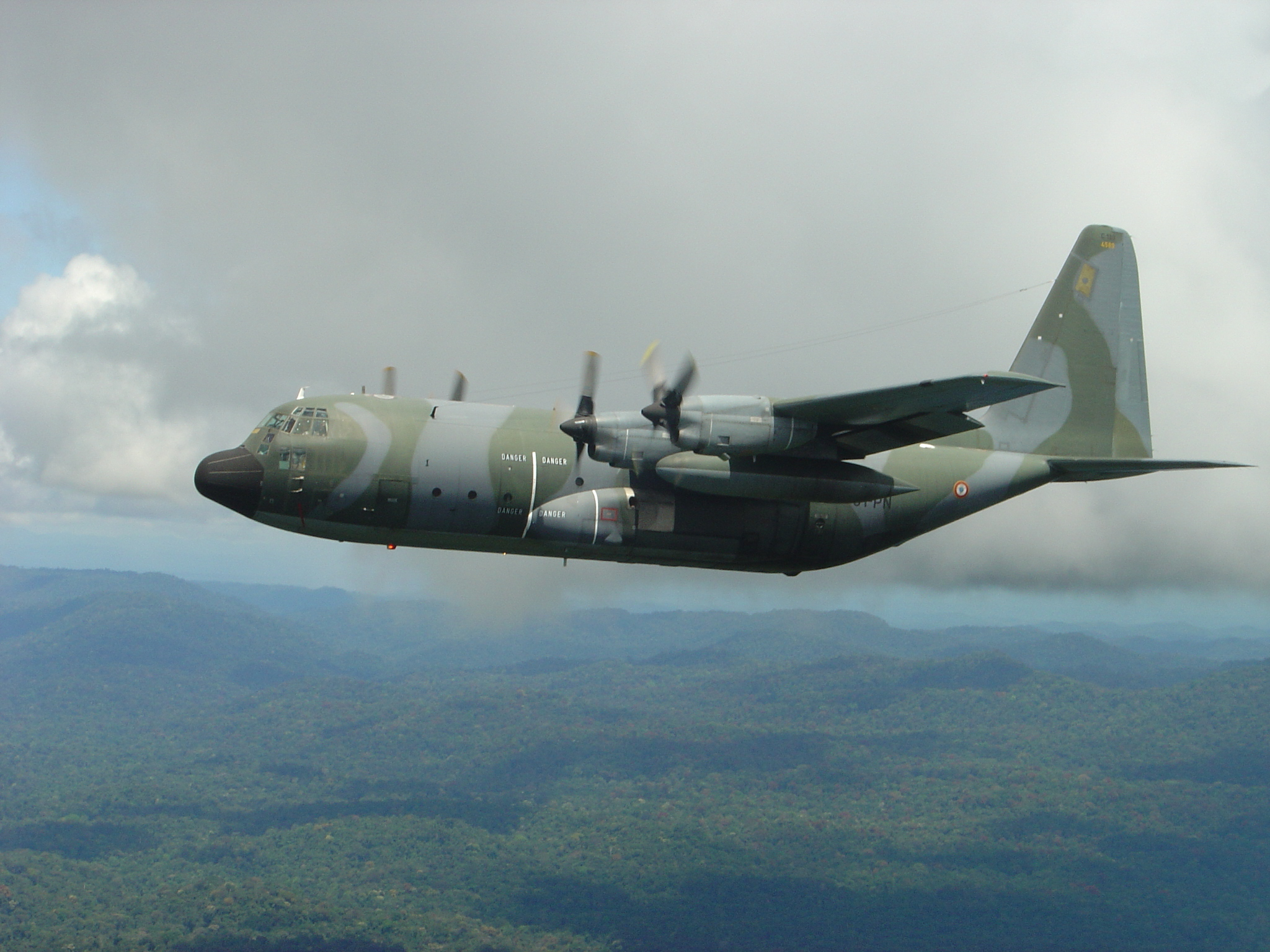 Photo d'un avion militaire français Hercules survolant la forêt gabonaise